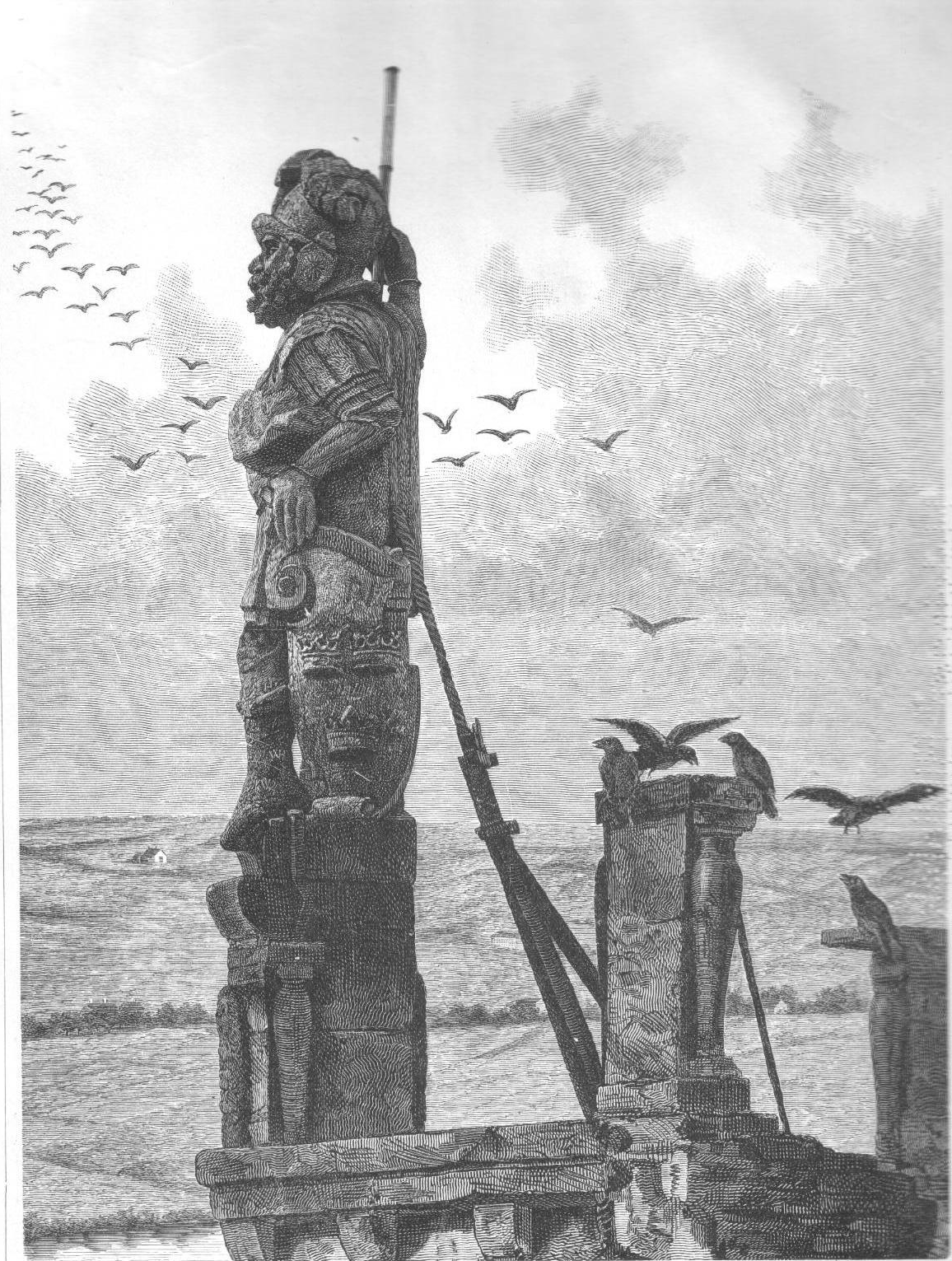 Kæmpen paa Koldinghus. Oprindeligt var Taarnet prydet med 4 Sandstens Statuer: Hannibal, Hektor, Scipio og Herkules. De to første ødelagdes 1658, Scipio styrtede ned under en Storm den 3/10 1854. Kun Herkules staar tilbage.